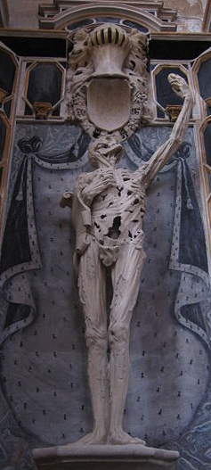 Detalle de Le Transi de Ren de Chalon